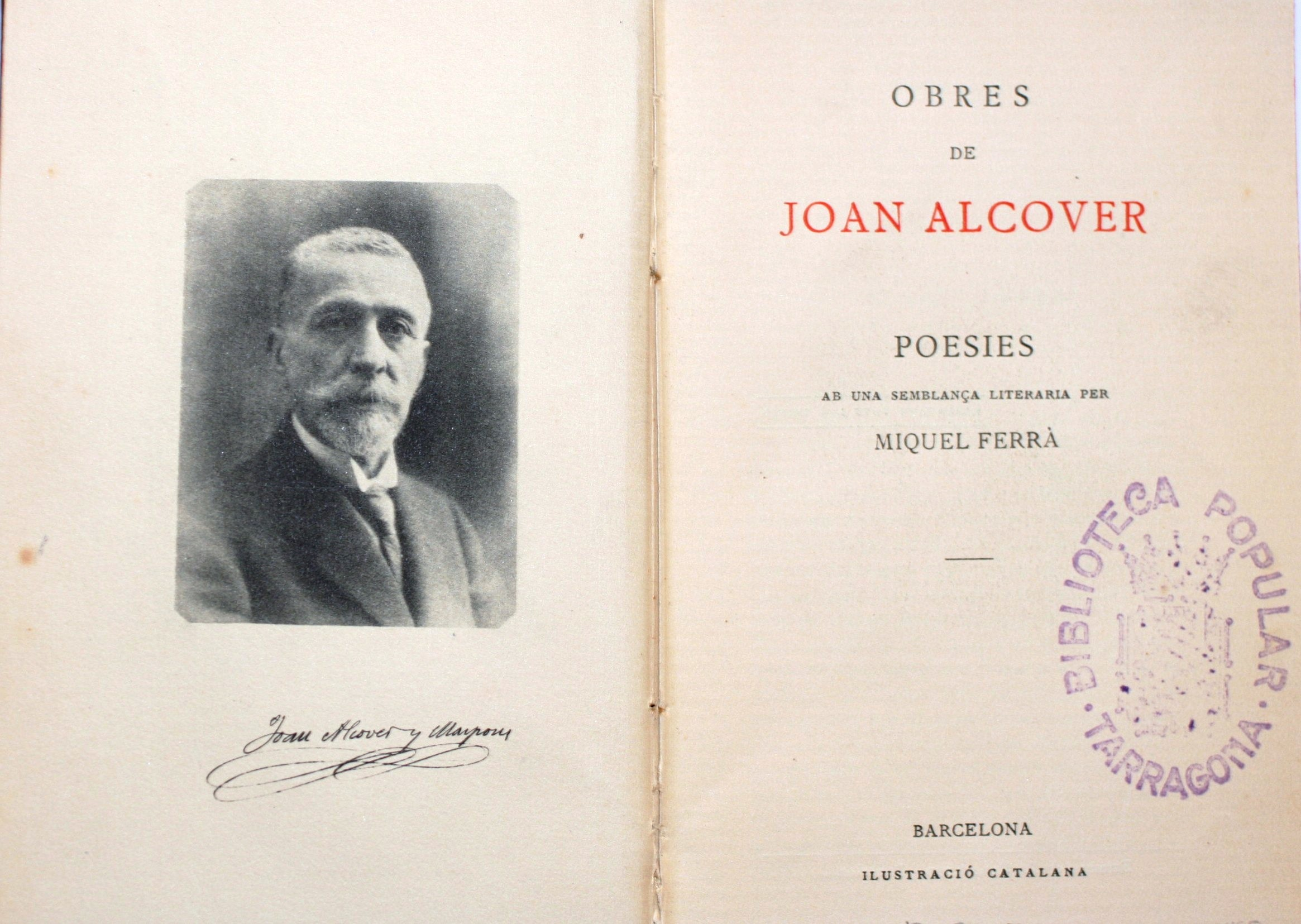 Joan Alcover i Maspons. Poesies. Barcelona : Ilustració Catalana, 1926